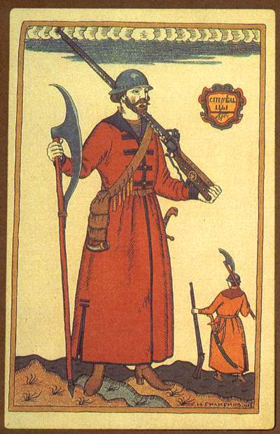 Билибин И. Стрелец. СПб.: Изд-во Общины Св. Евгении, начало ХХ в. Хромолитография. Из серии в 8 открыток, выполненных Билибиным по эскизам его костюмов к опере "Борис Годунов"